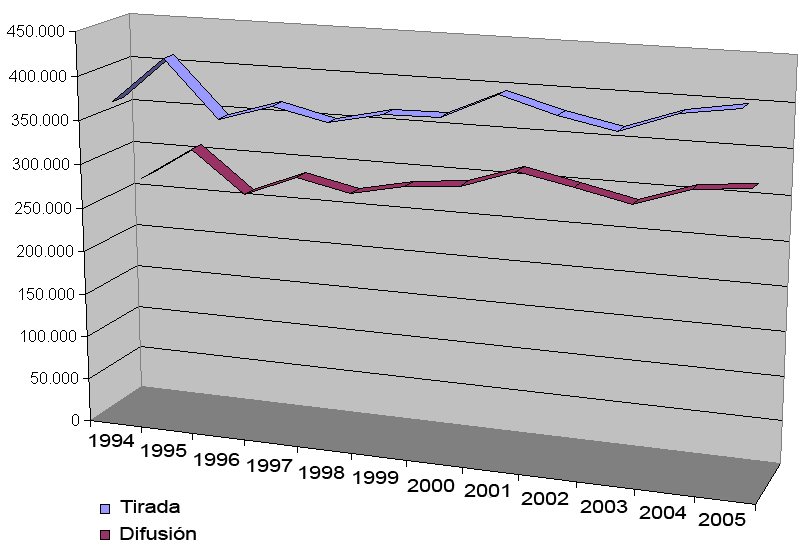 Difusión del diario español El Mundo, según la Oficina de Justificación de la Difusión (OJD).